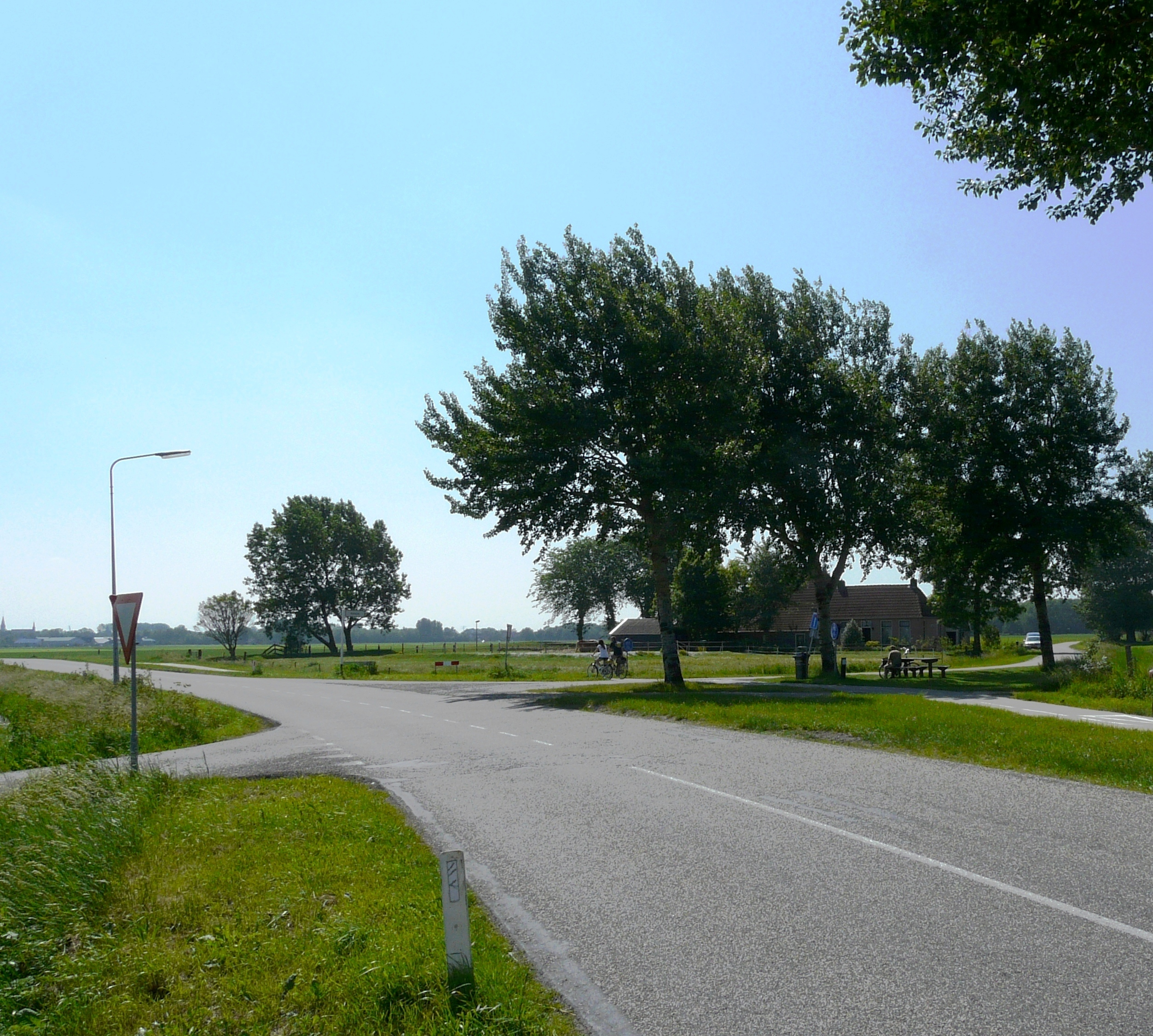 Het buurtje Swarte Mosk nabij Aalsum in Friesland